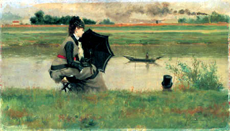 An der Seinetitle QS:P1476,de:"An der Seine" label QS:Lde,"An der Seine"